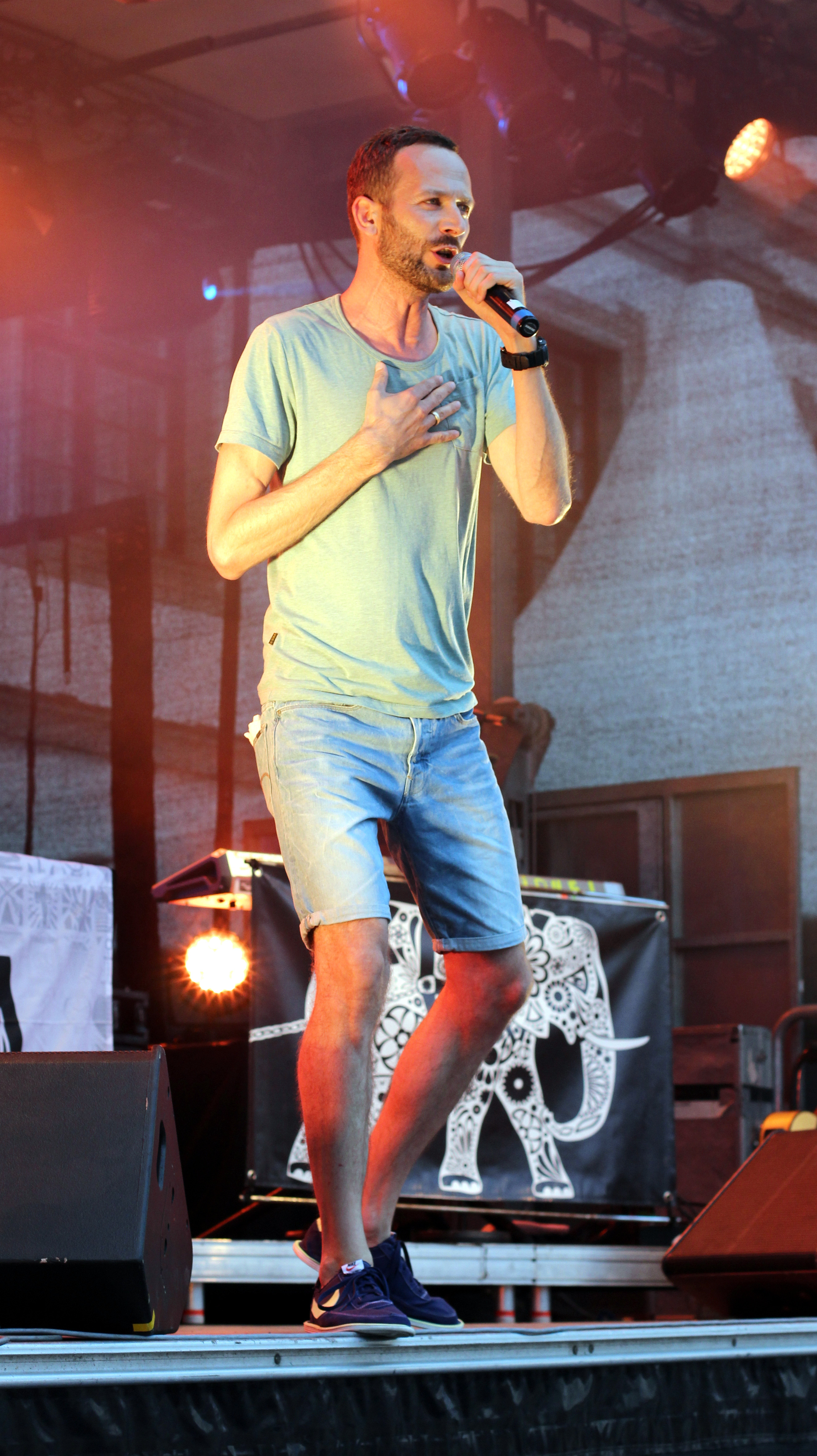 Konzert von Uwe Kaa (Konzert im Innenhof der Fürstäbtlichen Residenz in Kempten)